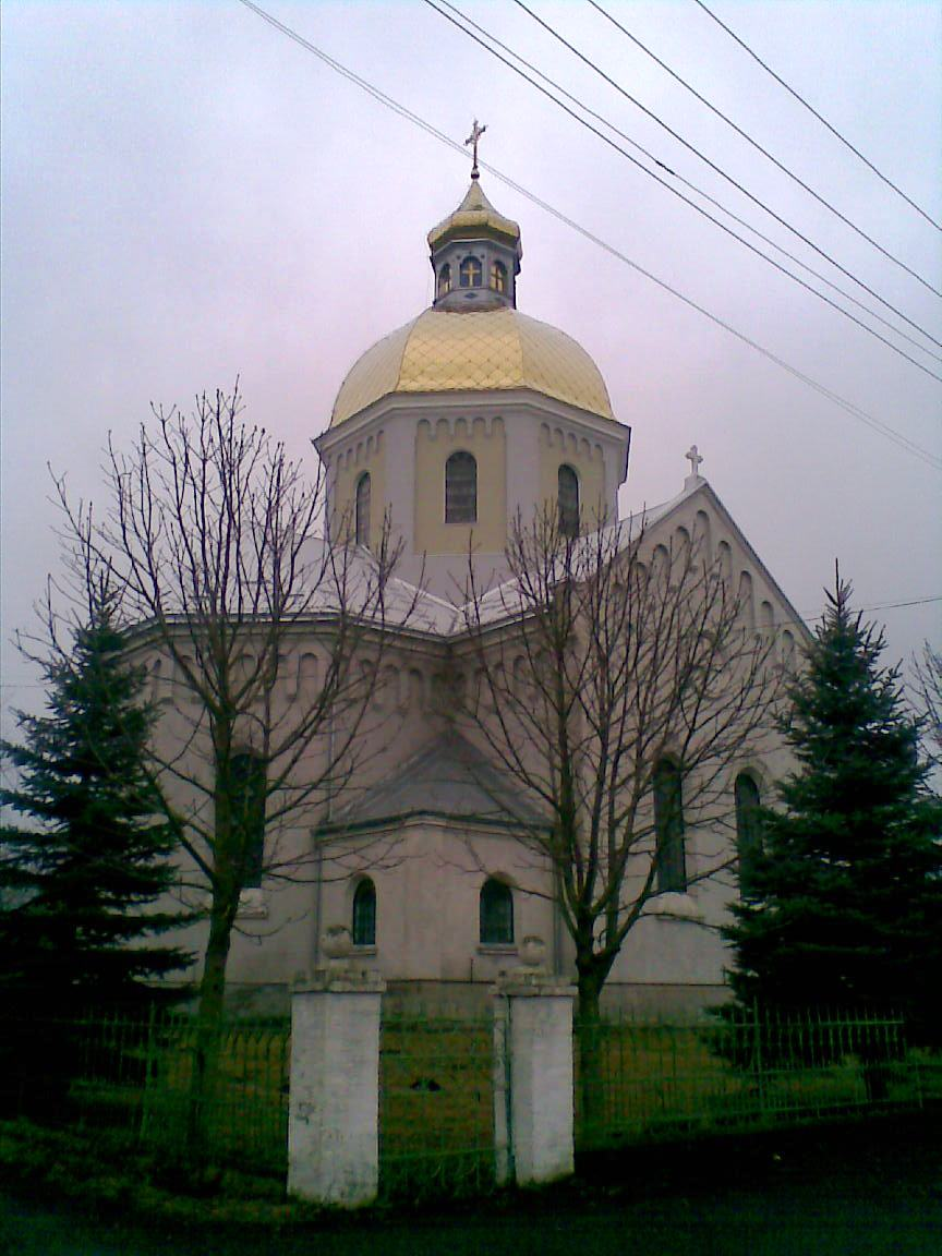 Церква Пресвятої Тройці (с. Озерна)